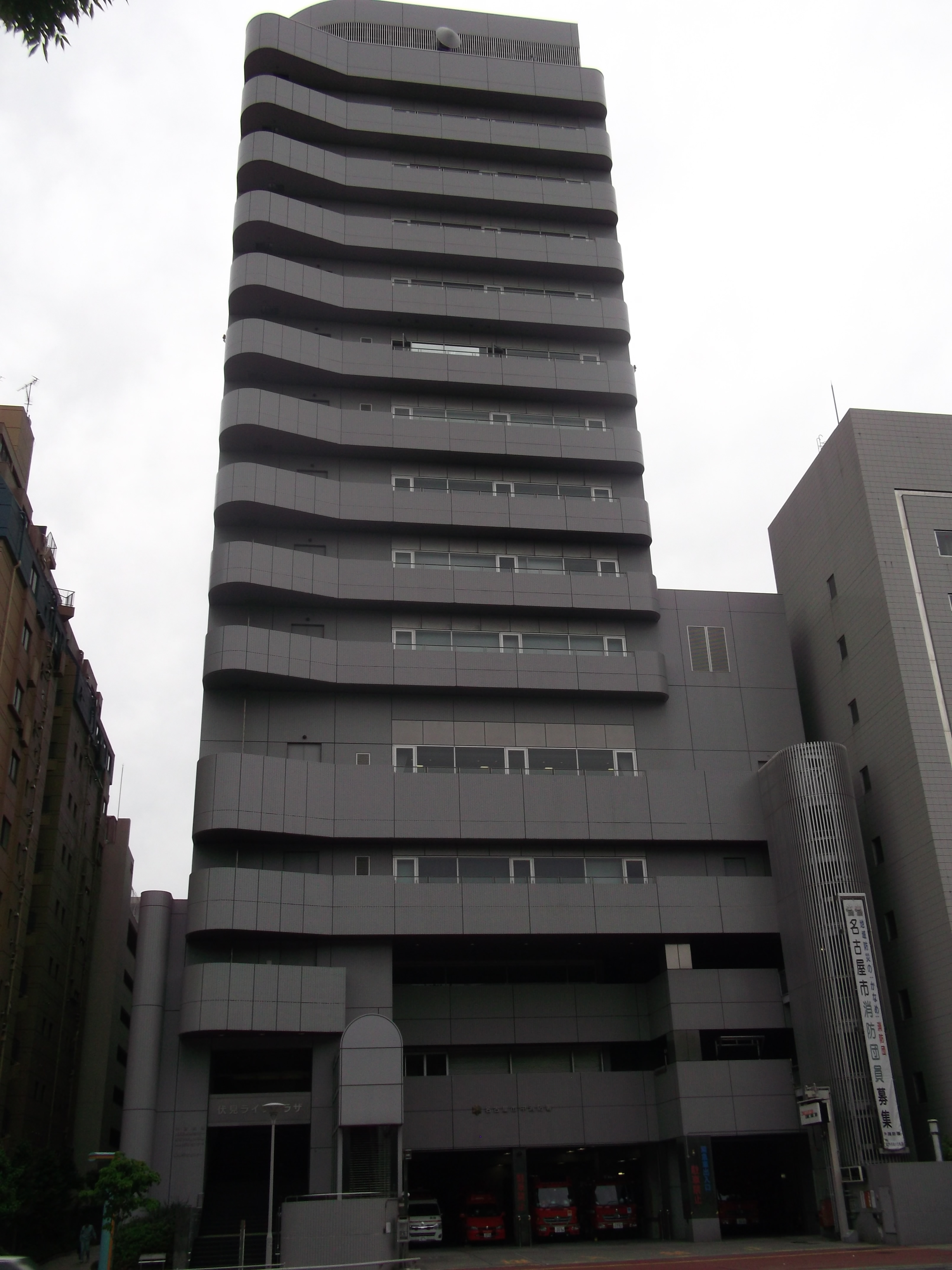 名古屋市中区にある名古屋市消防局中消防署を東側公道より写す